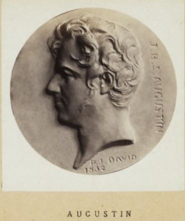 Jean-Baptiste Jacques Augustin (1759-1832), peintre, médaillon (1832) par David d'Angers, Pierre-Jean (1788-1856) in Les médaillons de David d'Angers réunis et publiés par son fils David d'Angers, Robert (1833-1912). 1867